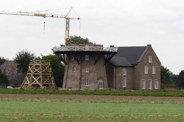 Mühlenneubau in Wegberg-Felderhof